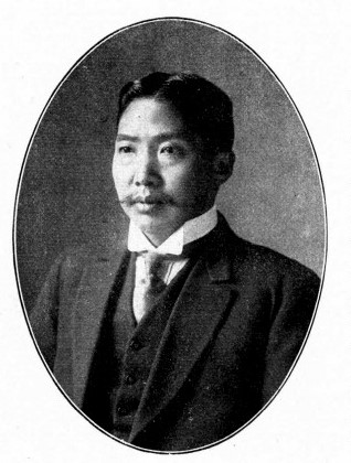 中文（台灣）: 中華民國國會議員